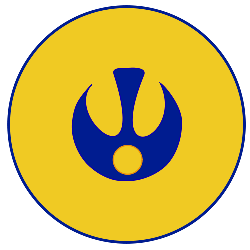 Эмблема Римского Армянского Легиона "Prima Armeniaca"